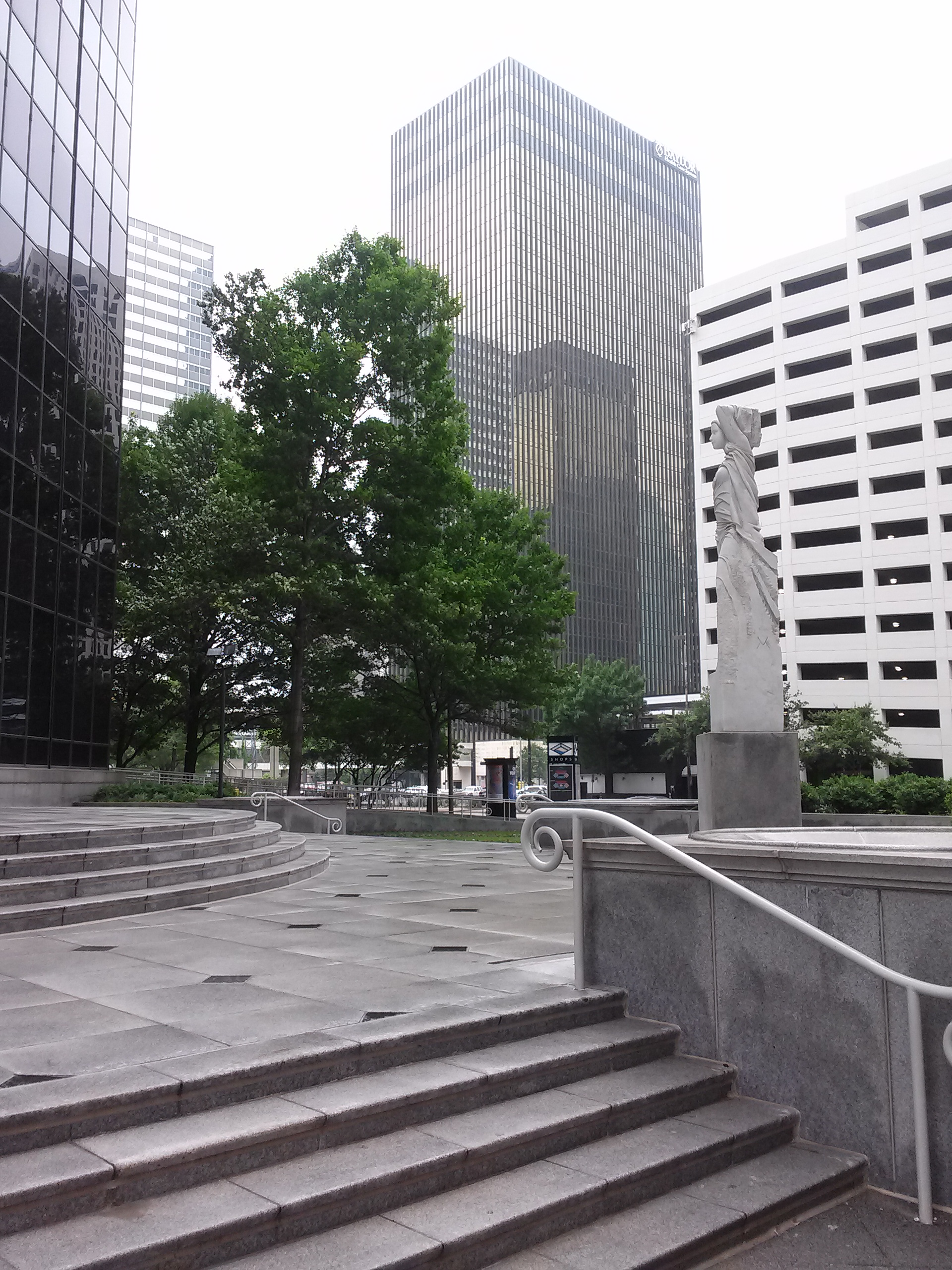 Fofotografía del centro de Dallas